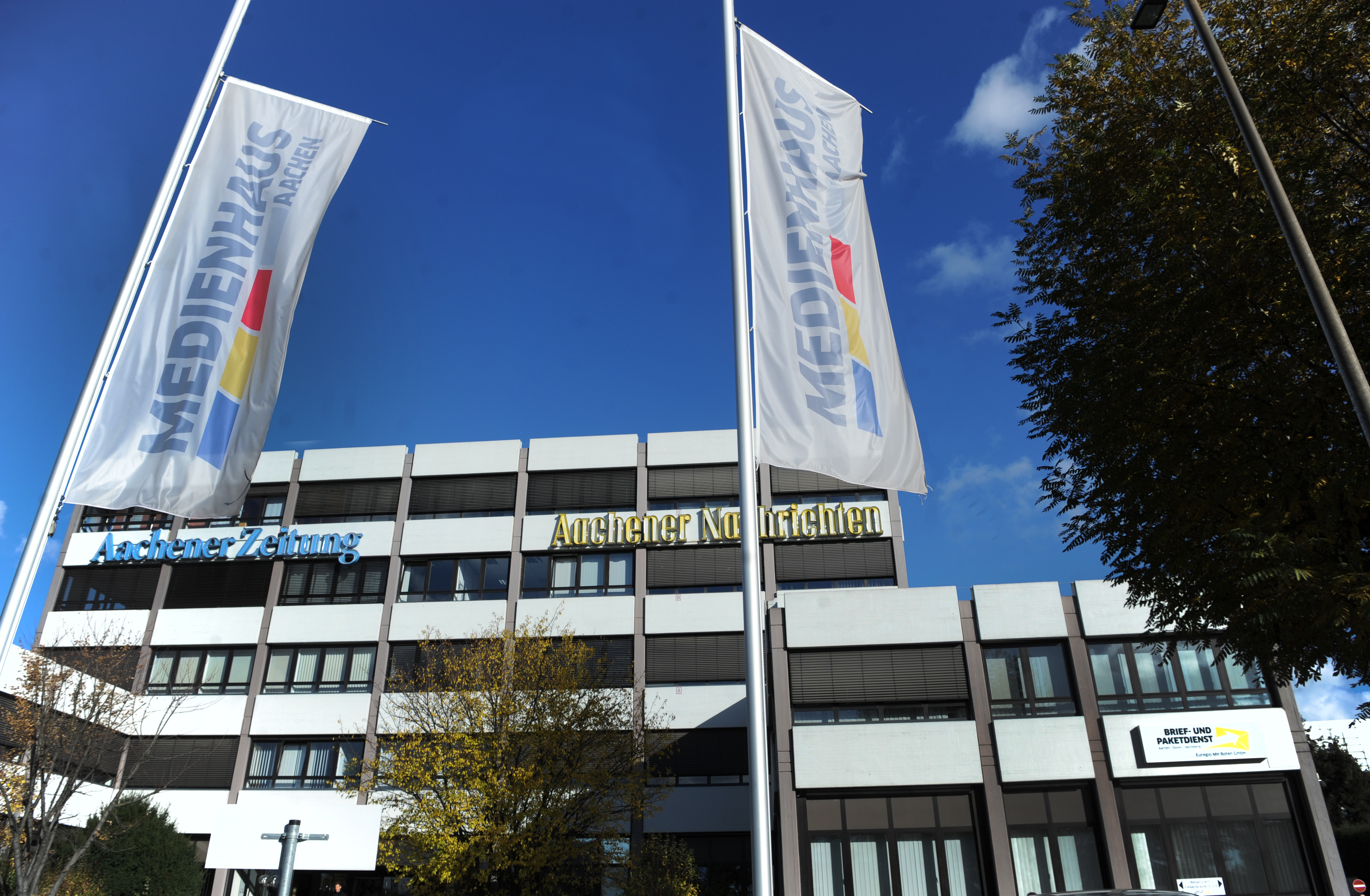 Foto: Harald Kroemer. Mehr als Aachener Zeitung und Aachener Nachrichten: das Medienhaus Aachen